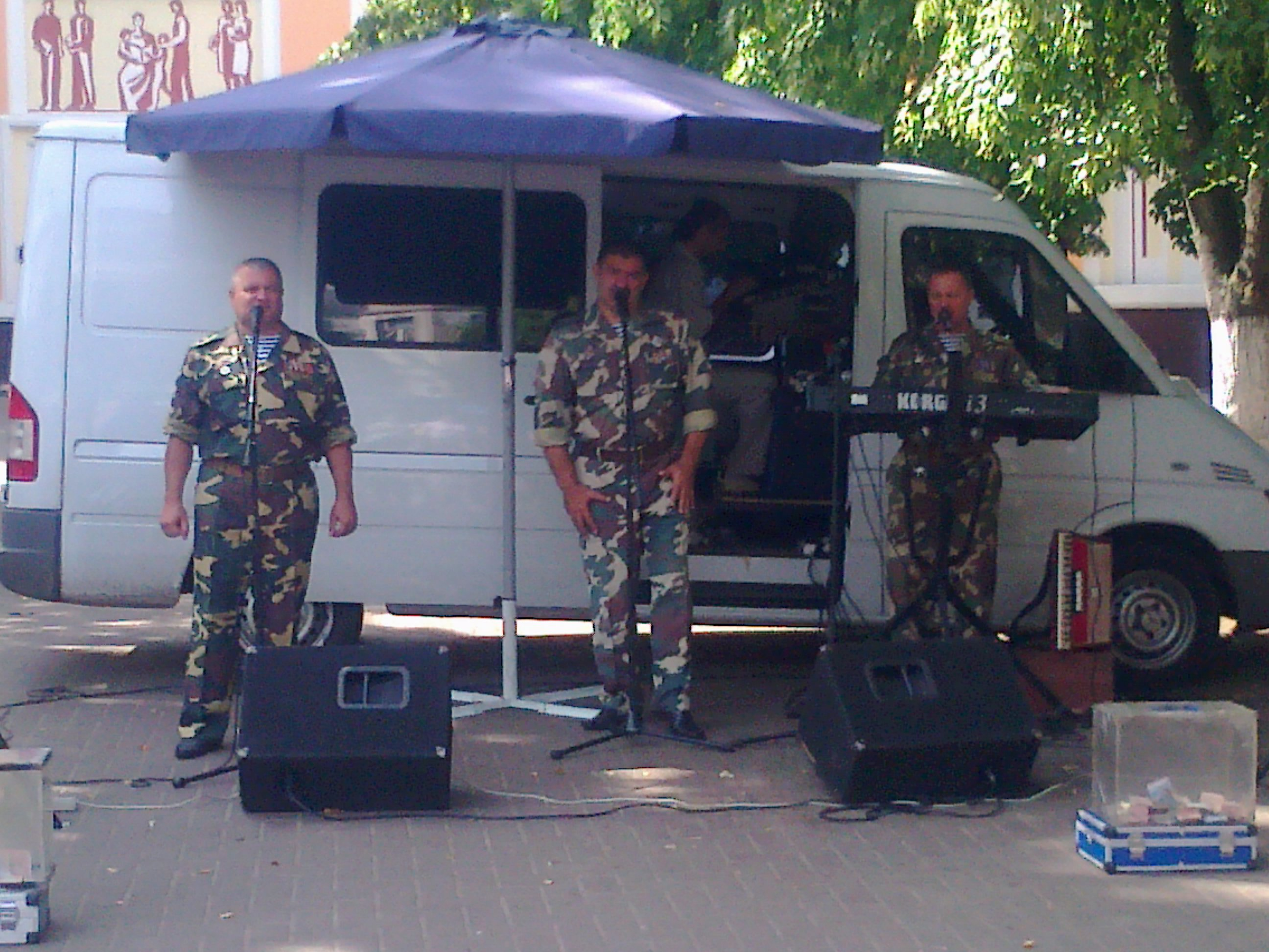 Гурт Контингент в м. Шостка.jpg